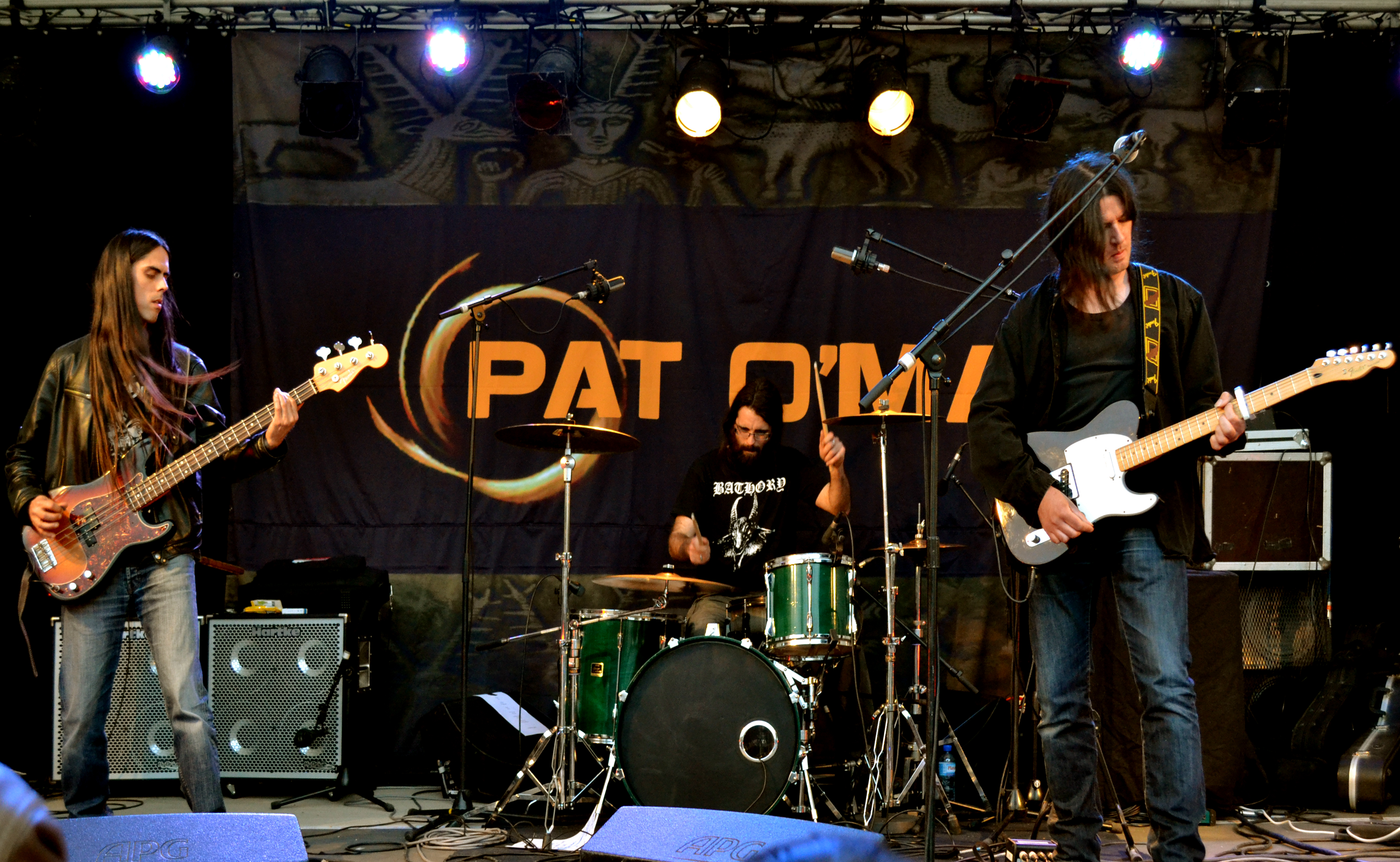 Concert de Brieg Guerveno (rock en breton) au Festy'Jeanne, festival des Légendes Celtiques, à Plouégat-Moysan le 4 mai 2013.